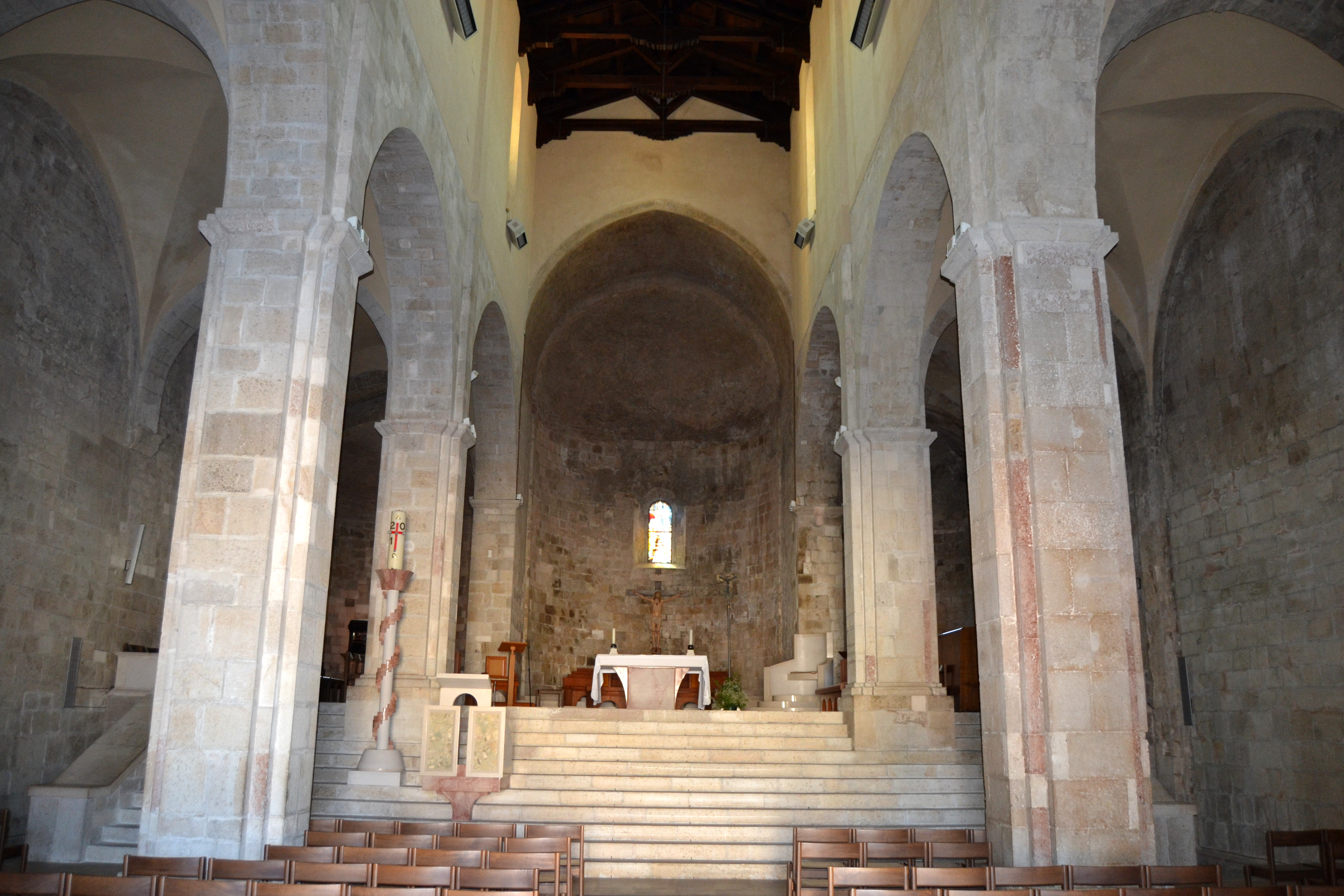 Duomo di Termoli, interno